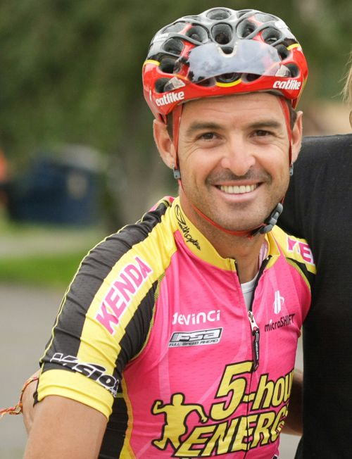 Paco Mancebo en el Tour de Utah 2013